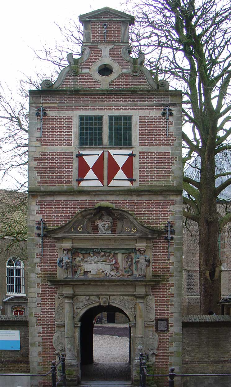 Het Lazaruspoortje te Gouda. LAZARUSPOORT van het Bestedelingenhuis. Rijk versierd poortje, fungerend als toegangspoort tot de tuin van het v.m. Catharina Gasthuis (Museum Gouda).